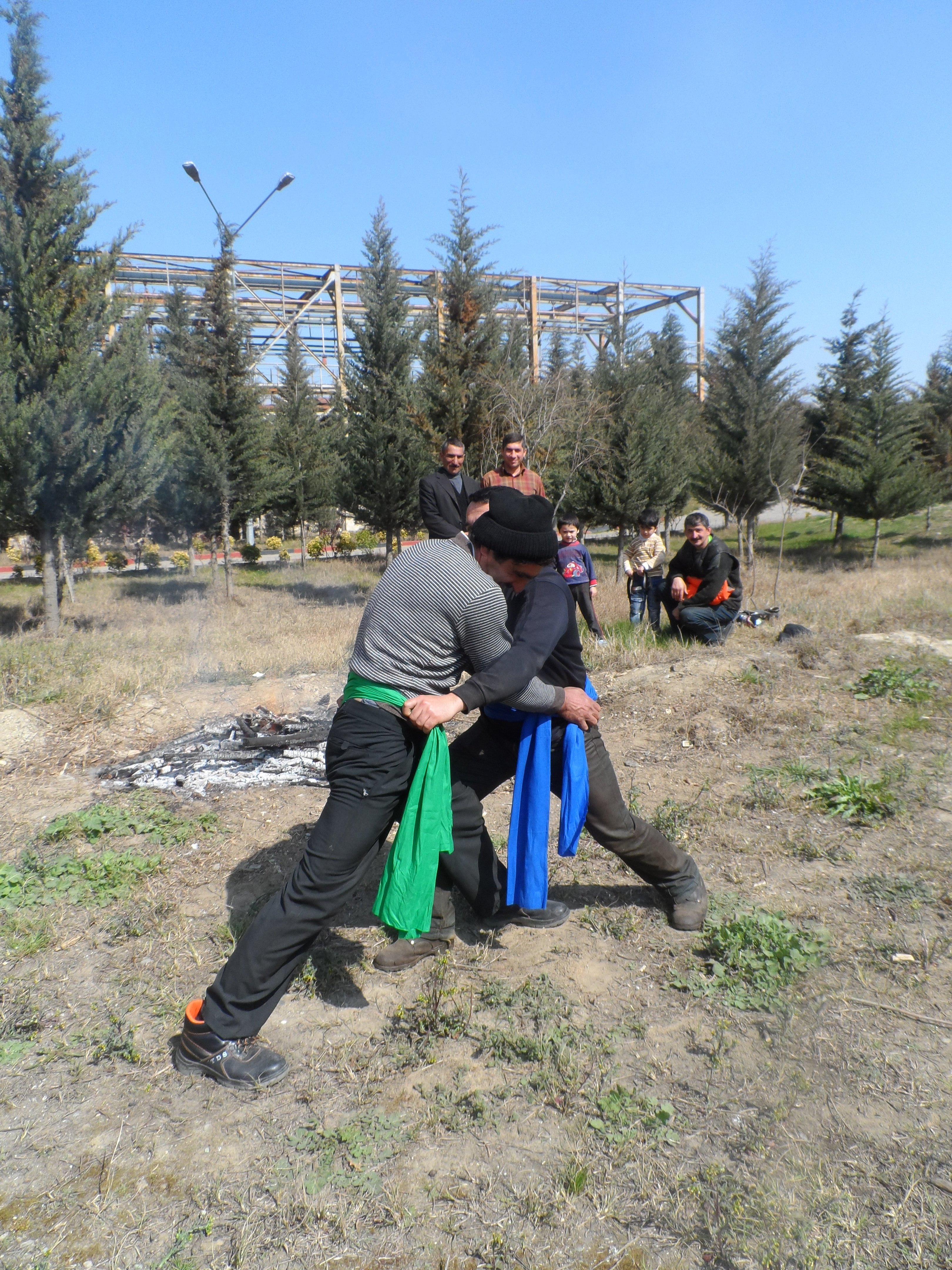 Qurşaqtutma - Azərbaycanda ən çox yazqabağı (bayramqabağı) günlərdə, eləcədə digər vaxtlarda, əsasən uşaq və gənclər arasında, geniş şəkildə oynanılan qədim oyunlarından biridir.